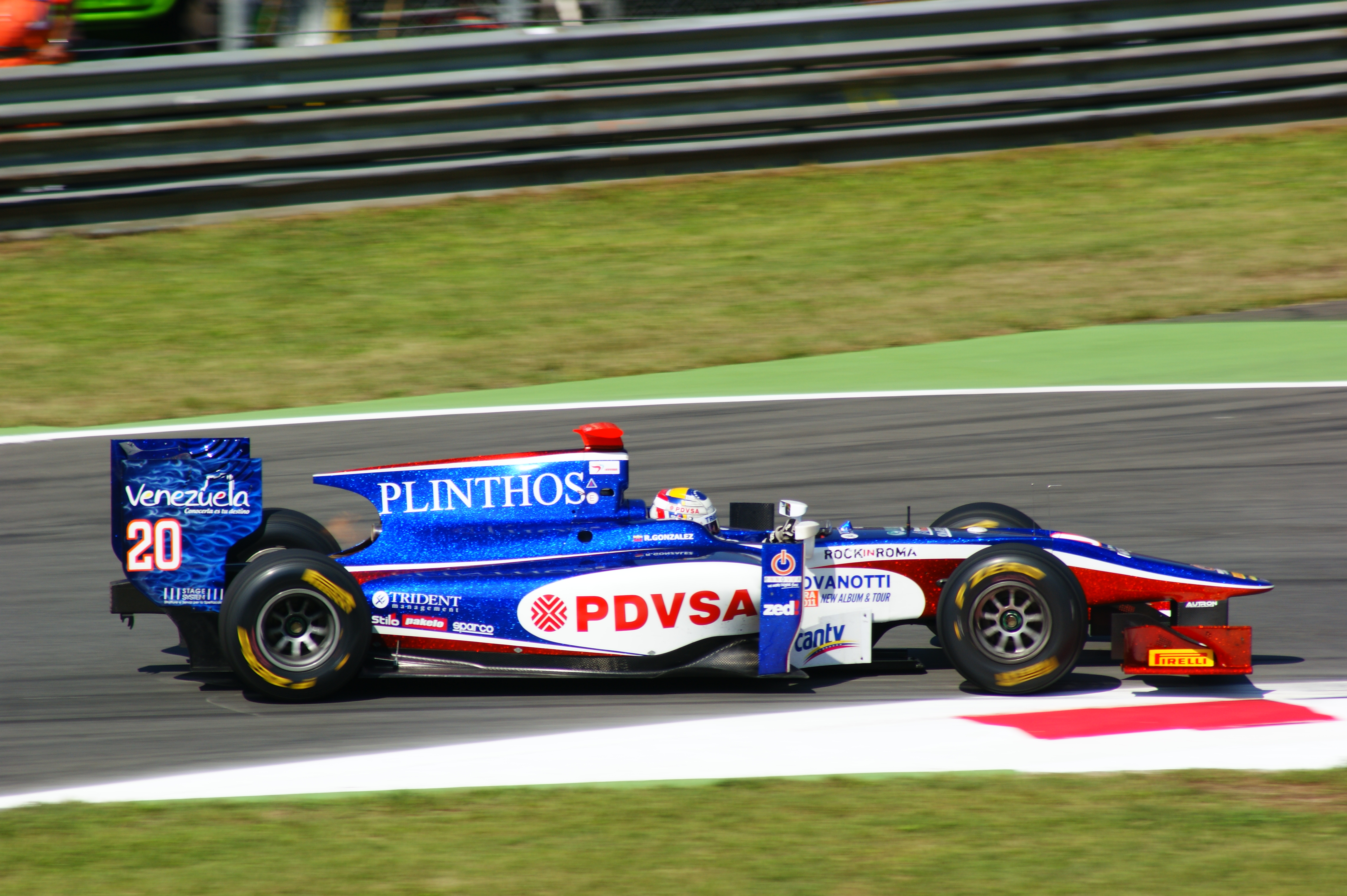 Rodolfo Gonzalez alla prima variante Monza 2011